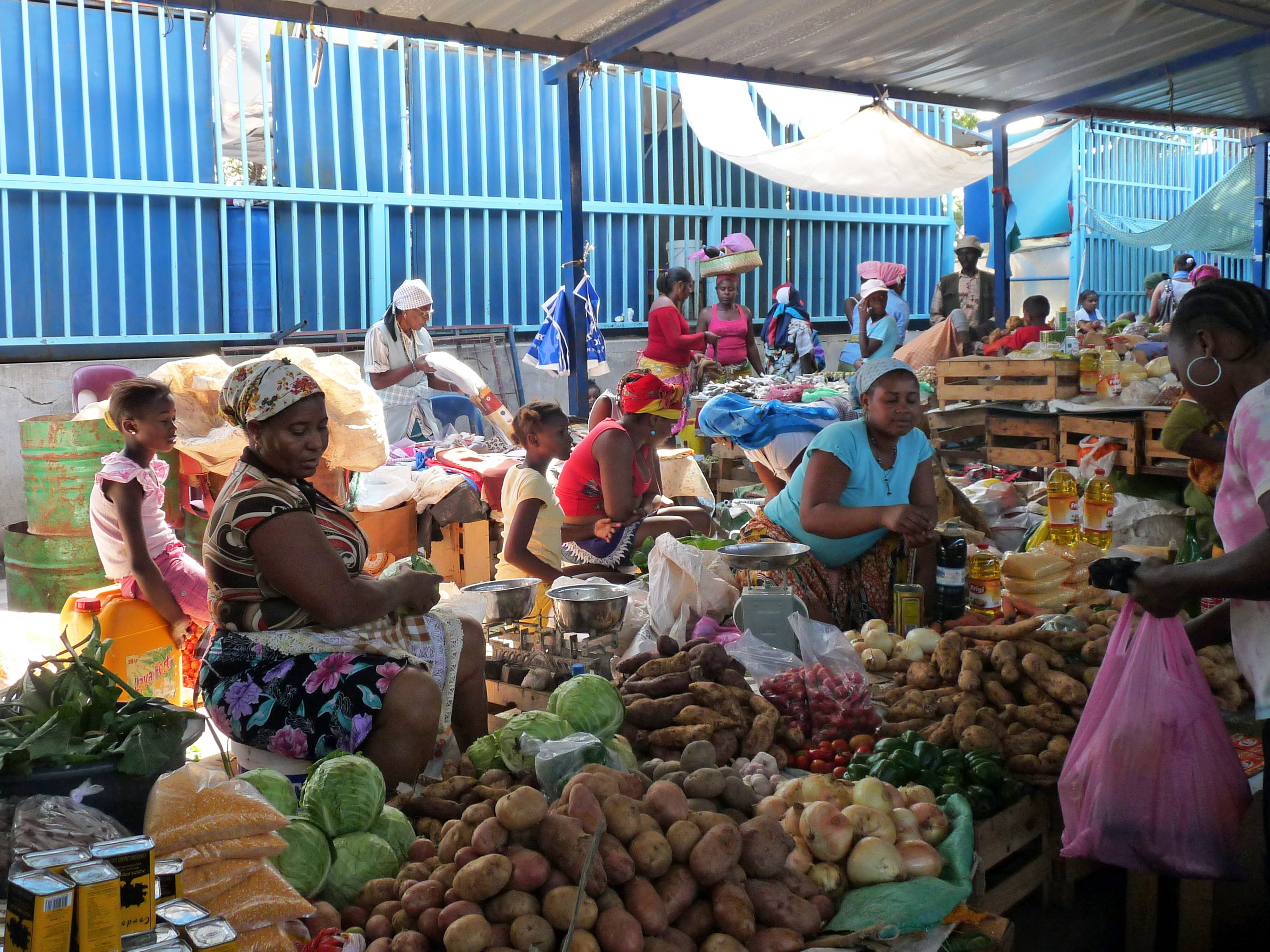 Marché de Praia (Cap-Vert)